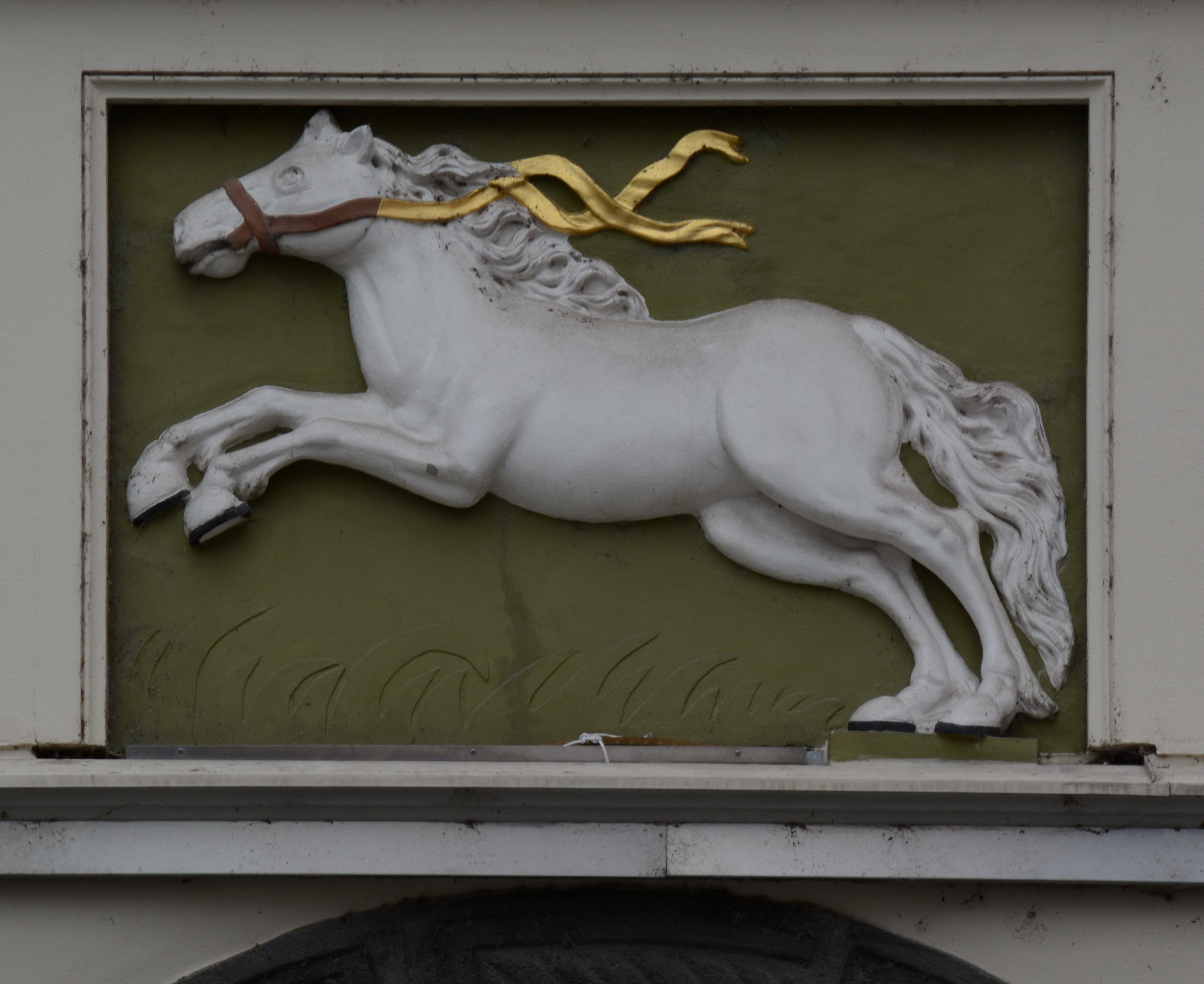 Měšťanský dům U bílého koníčka (Opava), Dolní náměstí 115/4, Opava